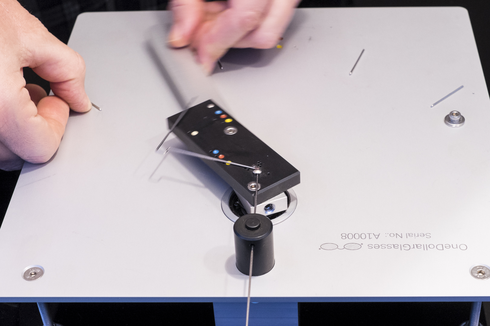 die EinDollarBrille: Mit dieser Biegemaschine wird die Brille vor Ort angefertigt